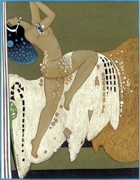 Salome